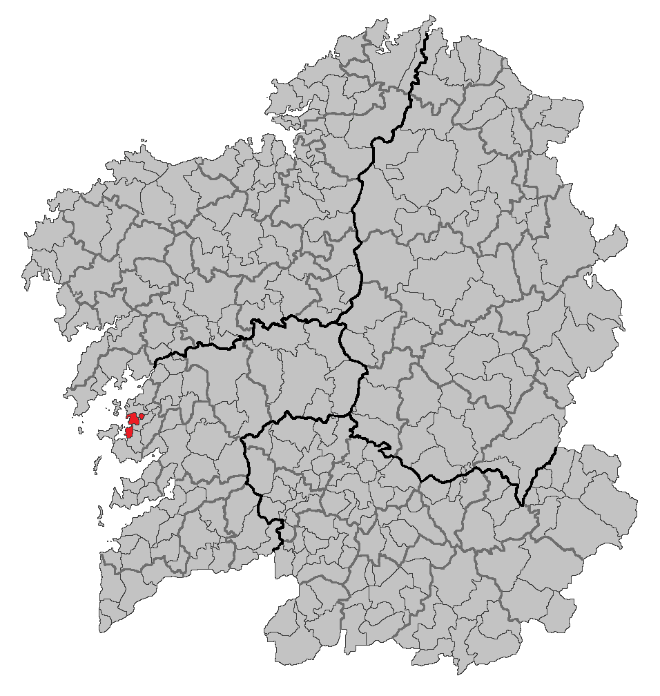 Mapa coa localización do concello de Cambados.